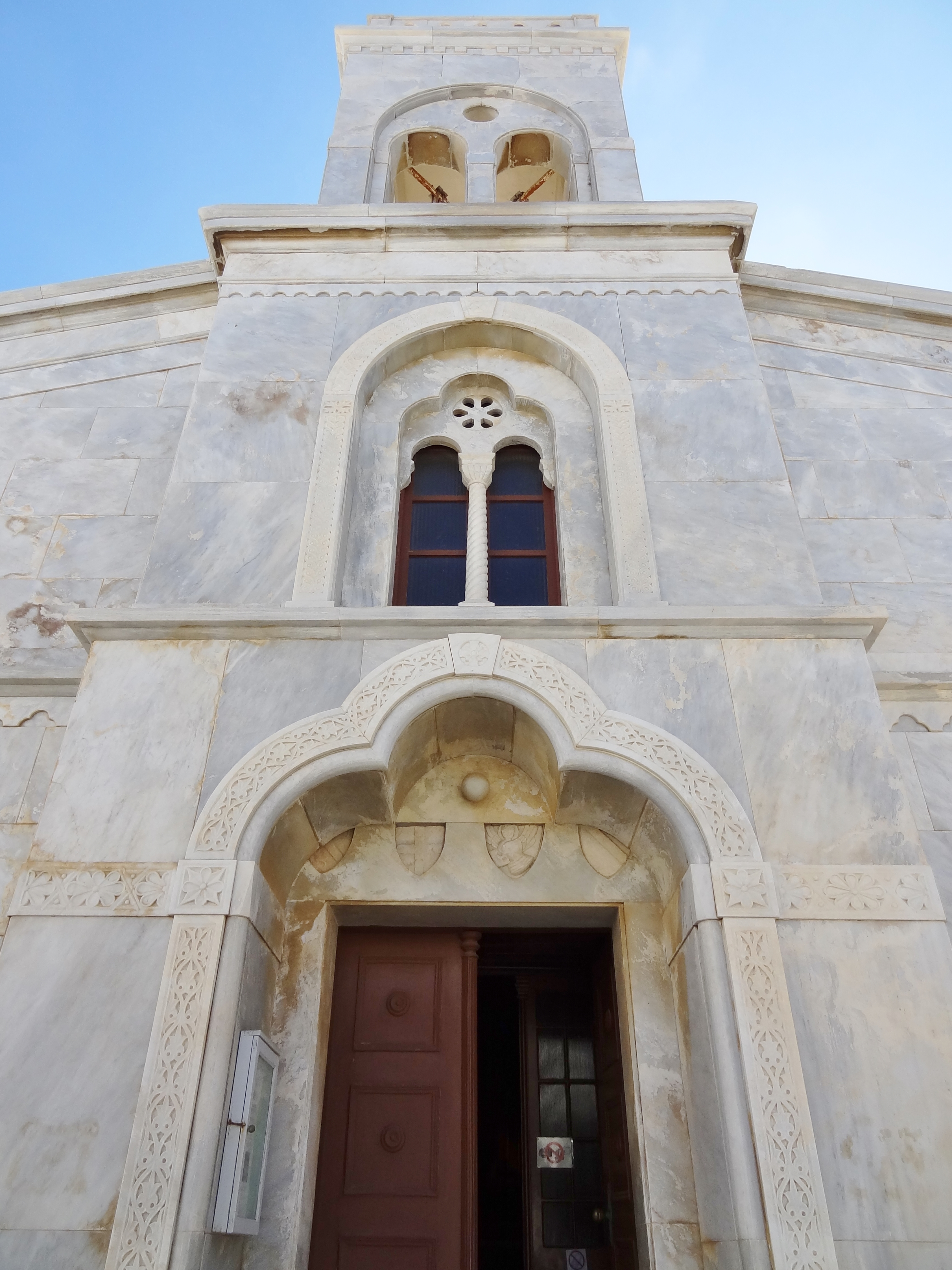 Eingang der Katholischen Kirche in Chora, Naxos, Kykladen, Griechenland